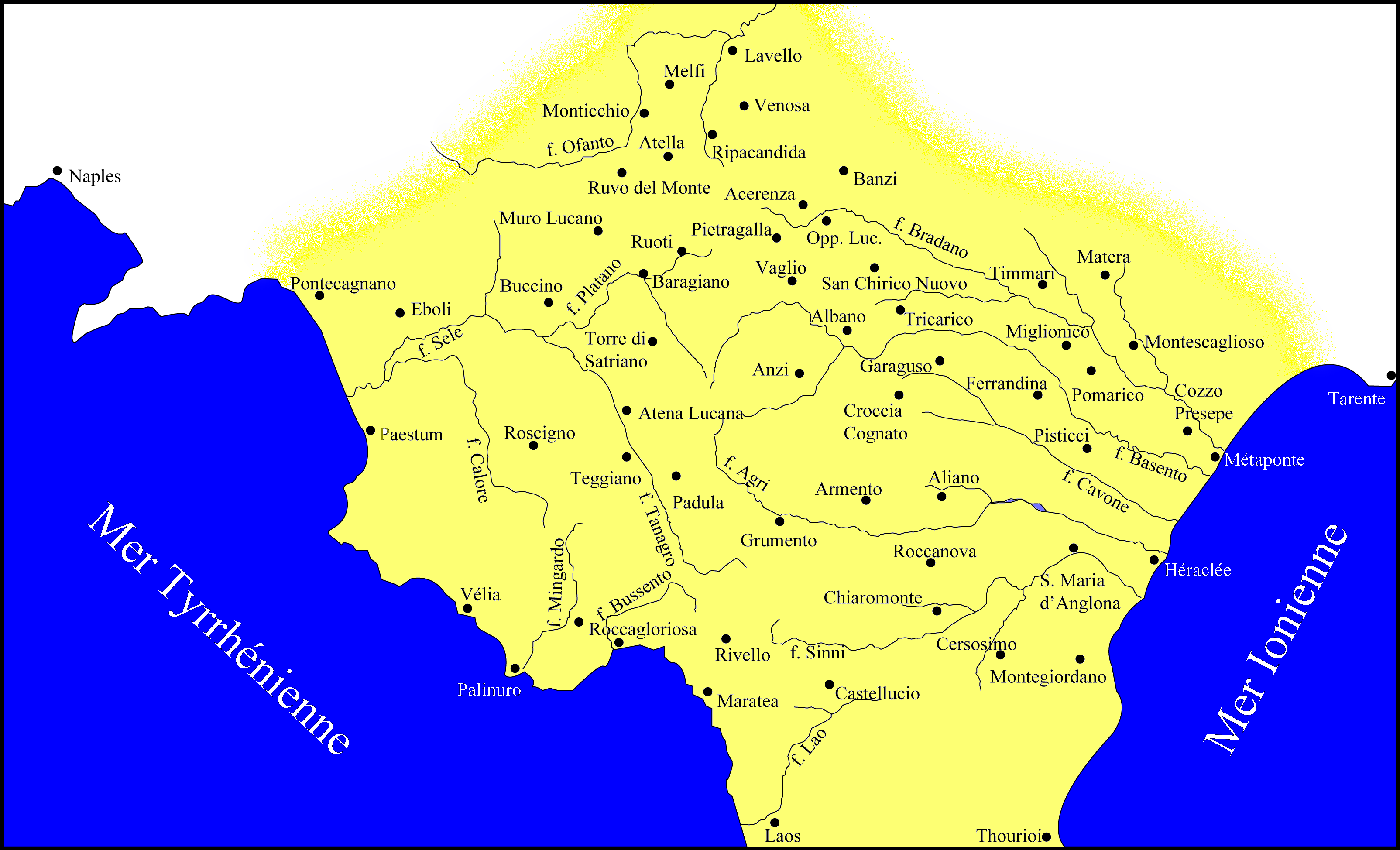 Carte des principaux sites archéologiques de la Lucanie antique